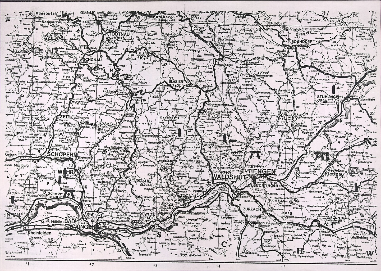 Karte der Standorte von Menhiren und Dolmen der Megalithzeit im Landkreis Waldshut/Wehr. Besitzer des Originals: Hans Parodi (†).